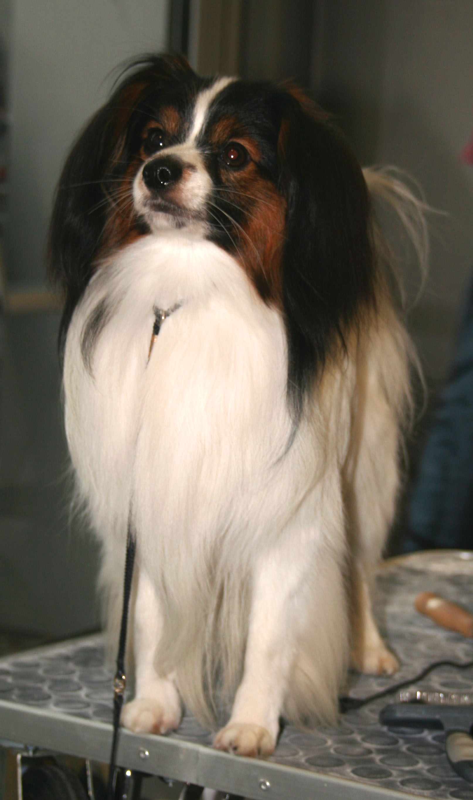 Spaniel_miniaturowy_kontynentalny_phalene na Światowej Wystawie Psów Rasowych w Poznaniu